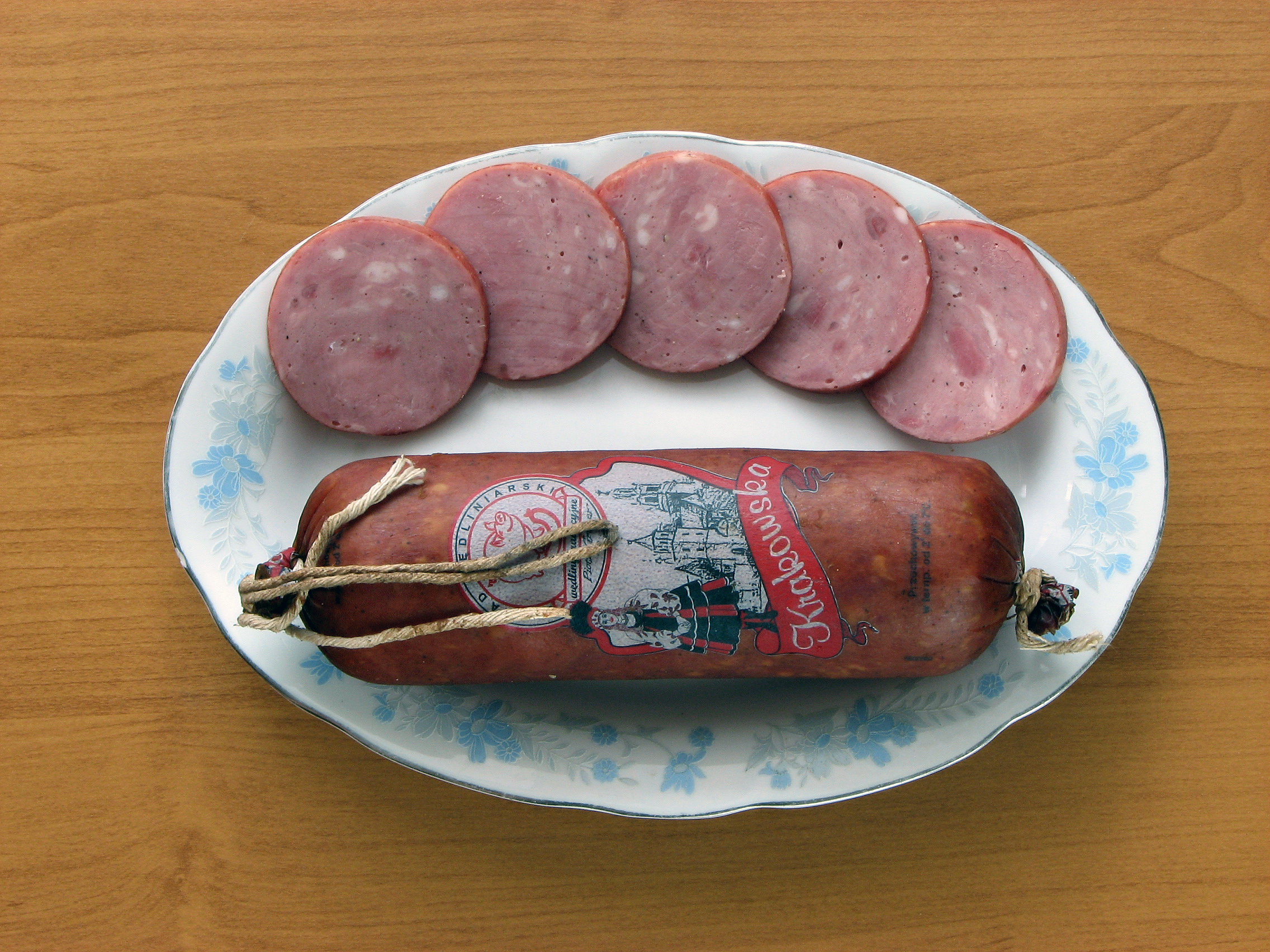 kiełbasa krakowska, krakowska sausage